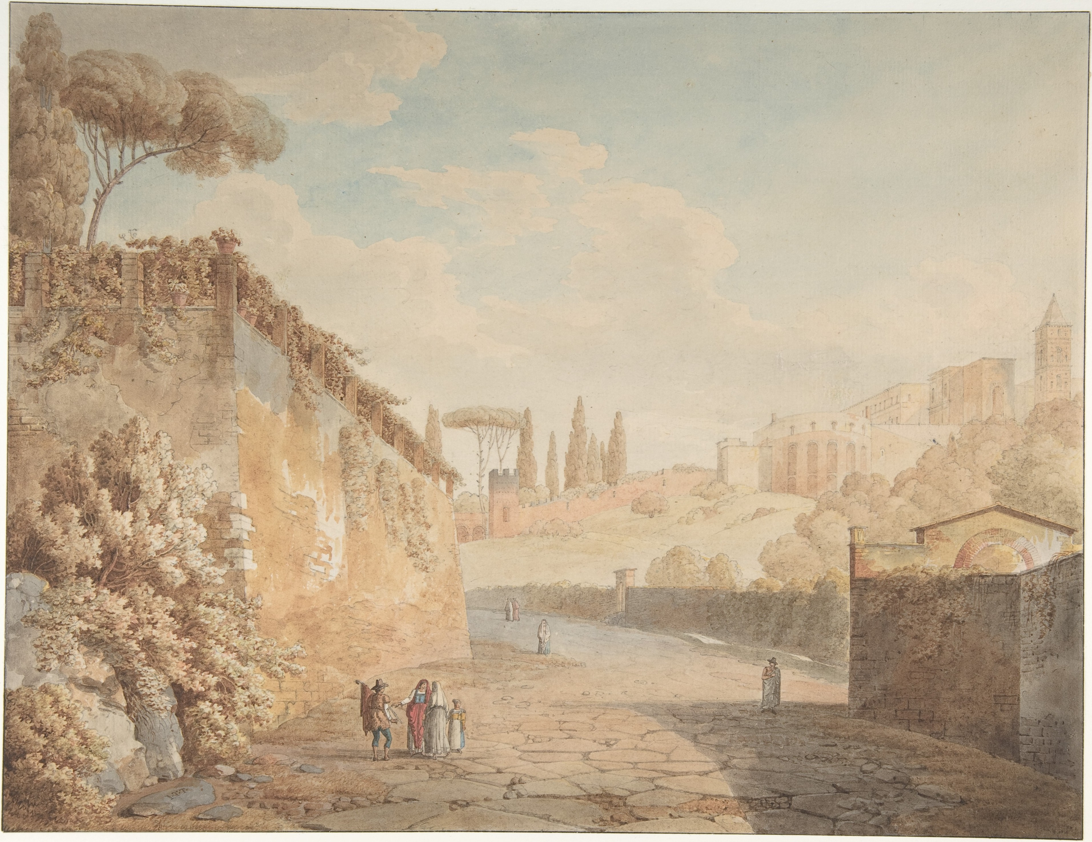 Drawing; Drawings